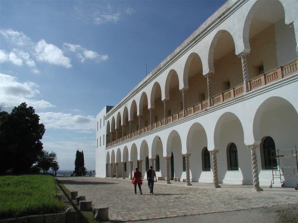 Façade du Musée national de Carthage (Tunisie)